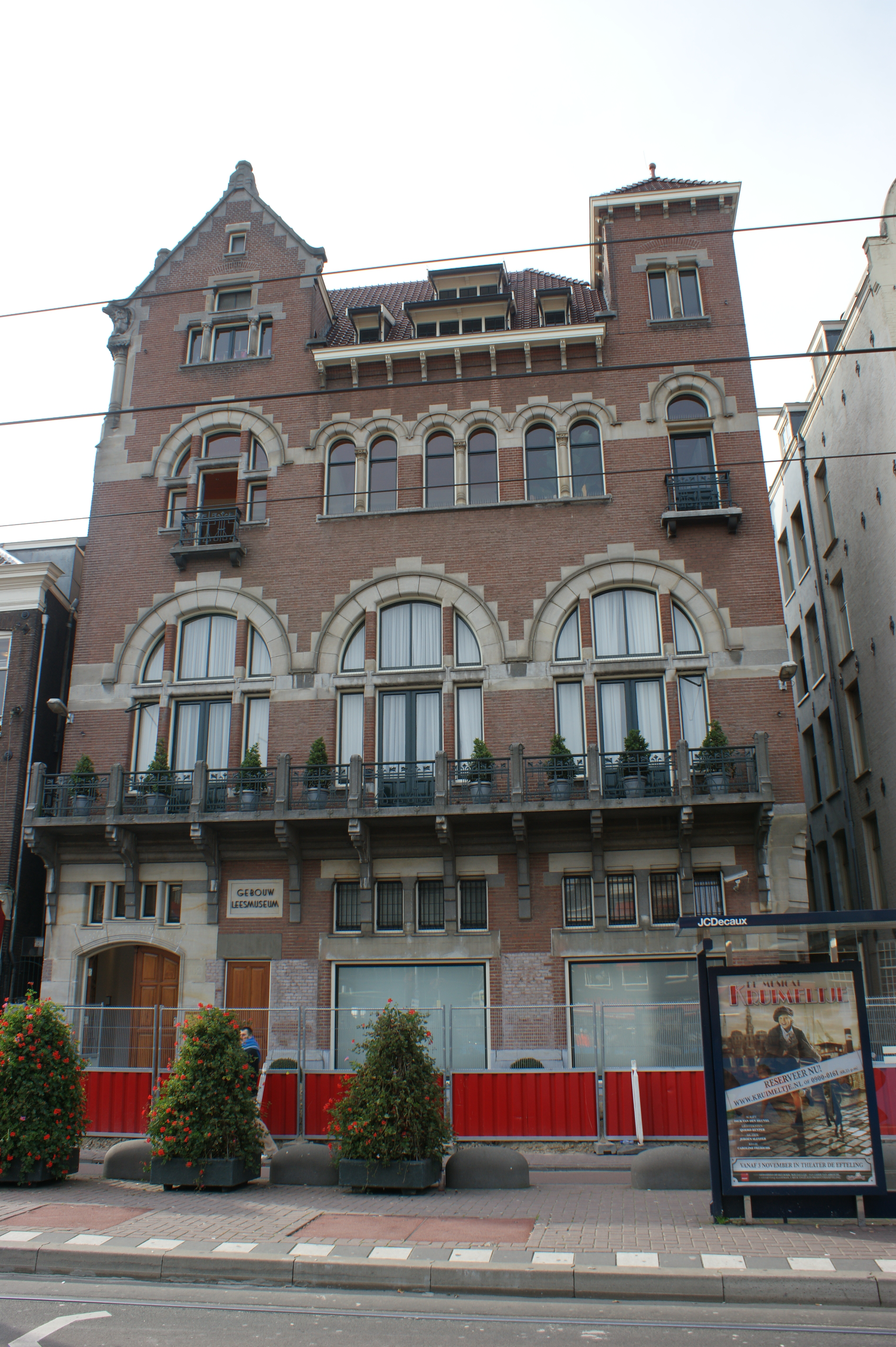 In 1902-1903 tot stand gekomen SOCIETEIT, genaamd 'Het Leesmuseum'. Circa 1800 werd het museum opgericht door A.R. Falck en C. van Vollenhoven. De architect is C.B. Posthumus Meyjesde. De hal is voorzien van tegels van Plateelbakkerij 'De Distel' (deels verwijderd)